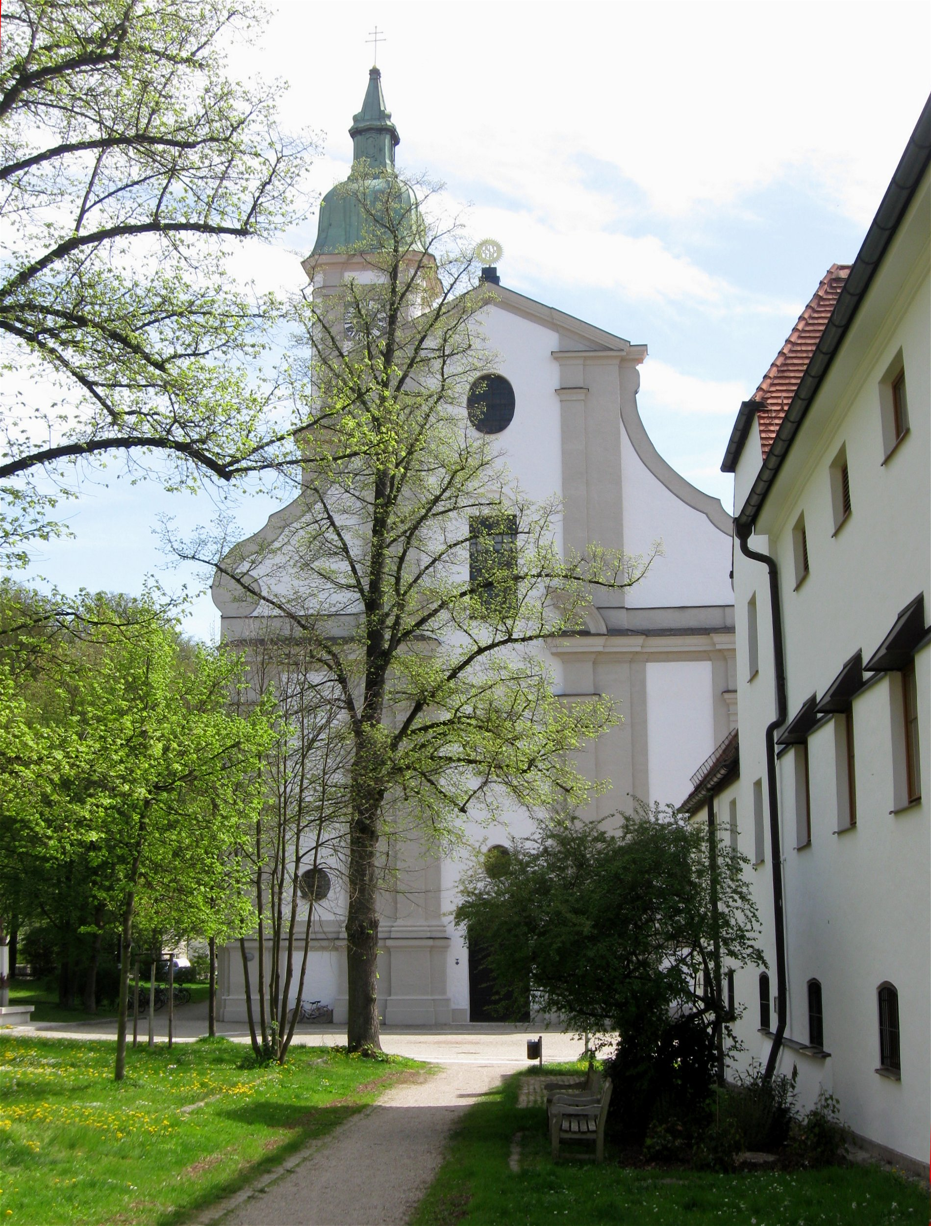 Alte Poststraße 42; Kath. Pfarrkirche St. Peter und Paul, ehem. Prämonstratenserkloster Neustift, Vierflügelanlage mit: ehem. Klosterkirche, Wandpfeilerkirche mit leicht eingezogenem Chor und seitlichem Flankenturm, von Giovanni Antonio Viscardi 1700-1715; mit Ausstattung; ehem. Klostergebäude, jetzt Landratsamt, dreigeschossiger vierflügeliger Putzbau mit Walmdach und Aufzugsgauben, 4. Viertel 17. Jh.; ehem. Klosterbibliothek, zweigeschossiger Putzbau mit steilem Satteldach und Fassadengliederung, 17. Jh.